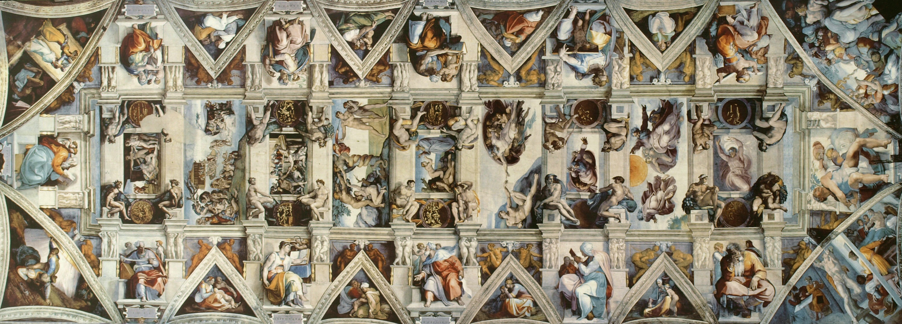 Сикстинська каплиця